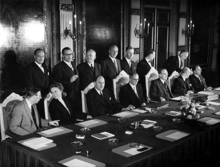 Eerste zitting nieuwe kabinet Drees 12-10-1956. Vlnr: Jelle Zijlstra, Marga Klompé, J.M.H.A. Luns, A.A.H. Struyken, Willem Drees, Ivo Samkalden, J.M.L.Th. Cals staand vlnr: Hendrik Jan Hofstra, H.B.J. Witte, C. Staf, Sikko Mansholt, J. Algera, J.G. Suurhoff en de secretaris van Willem Drees.